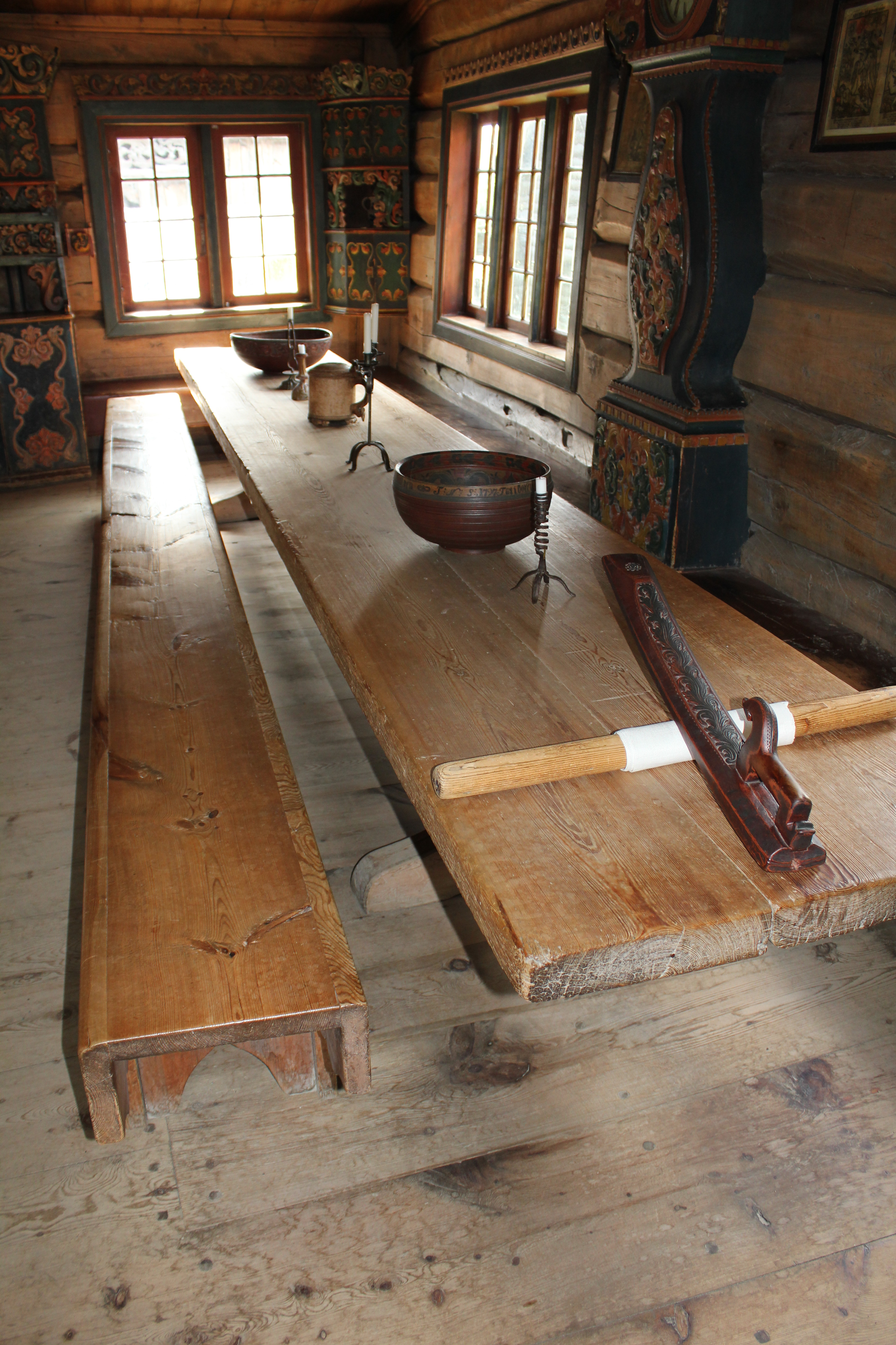 Gammelt langbord på Maihaugen.